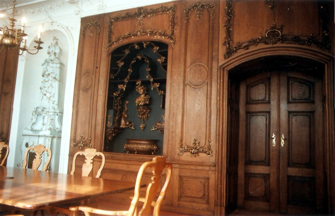 Dimkersches Zimmer - Detail